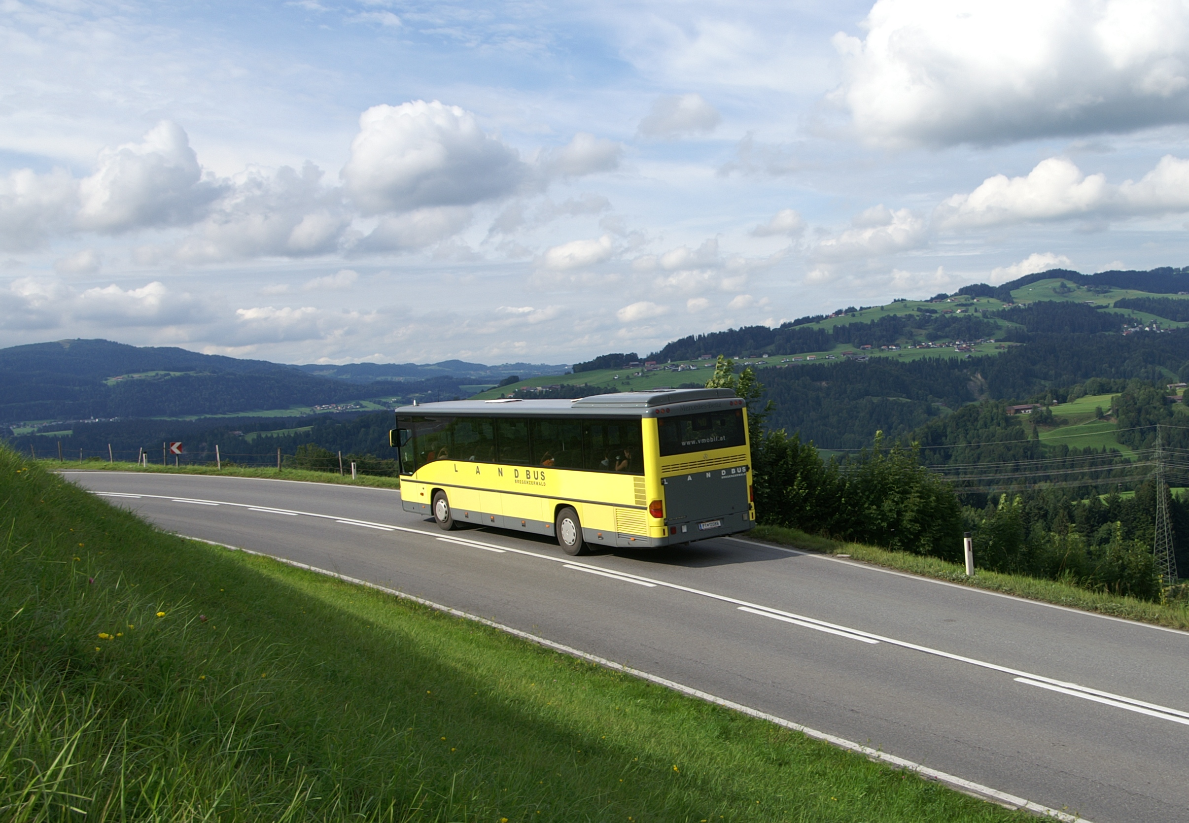 der Landbus Bregenzerwald von Damüls über Au (Vorarlberg), Bezau, Alberschwende nach Dornbirn im Hintergrund einen Ortsteil von Doren